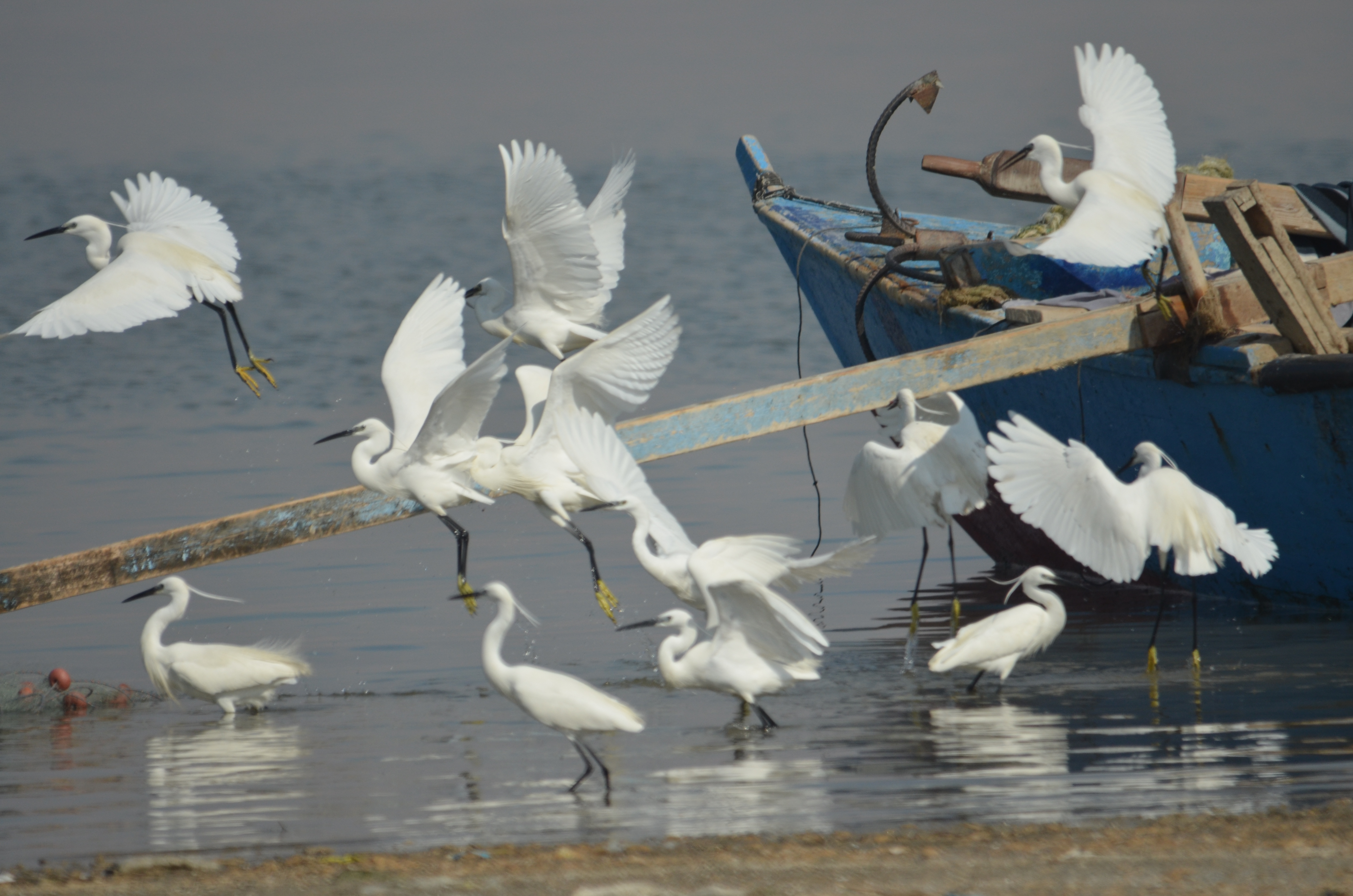 محمية قارون - قرية تونس - الفيوم